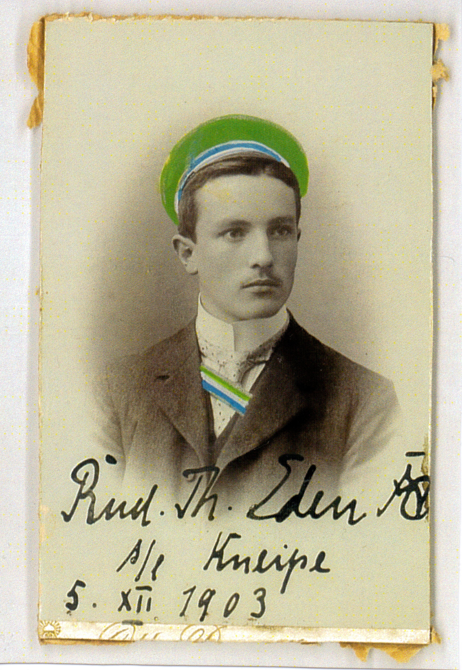 Fotografie von Rudolf Theis Eden